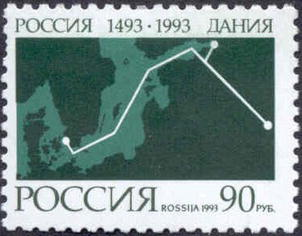 Почтовая марка России, выпущенная к 500-летию установления договорных отношений между Россией и Данией. На марке изображена карта Балтийского моря и части Европы и схема построенной в 1993 году подводной оптической линии связи. Художник — Ю. Арцименев. Тираж — 1 млн экз.